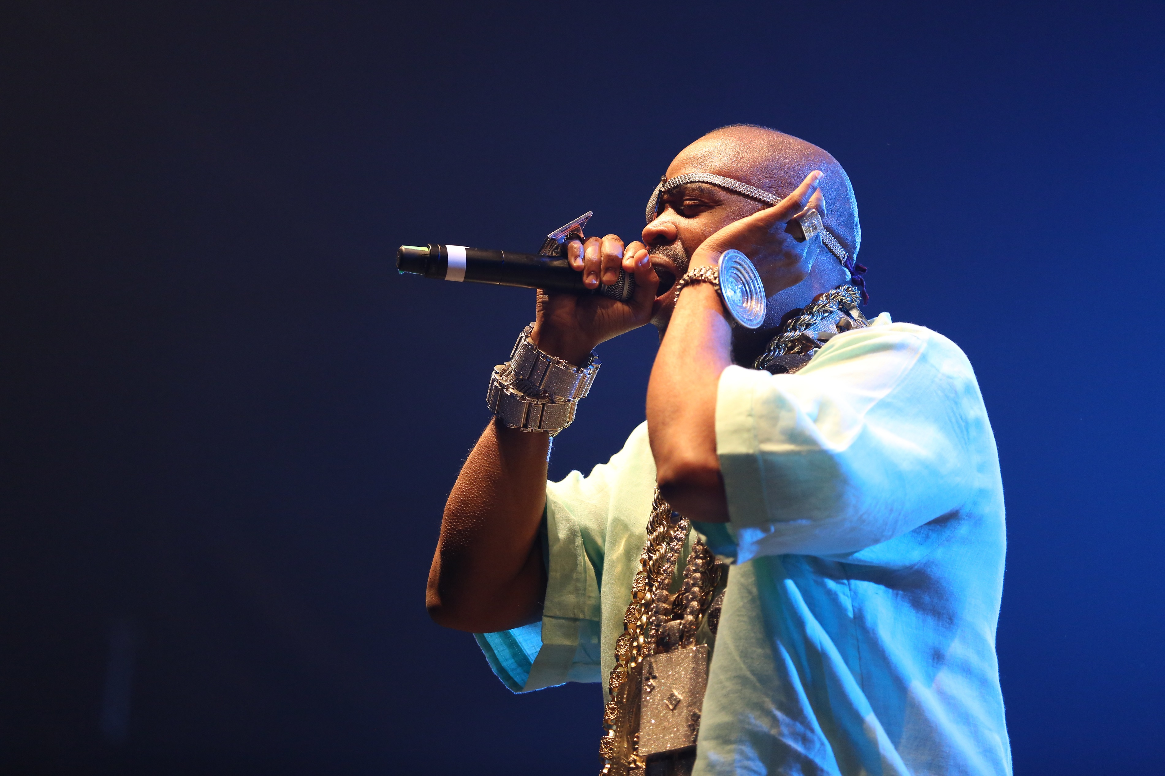 Slick Rick beim Out4Fame-Festival 2016